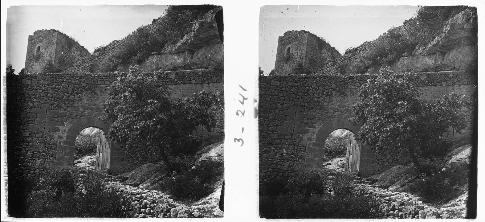 Entrada al castell d'Alaró a Palma de Mallorca. Josep Salvany i Blanch (1915)